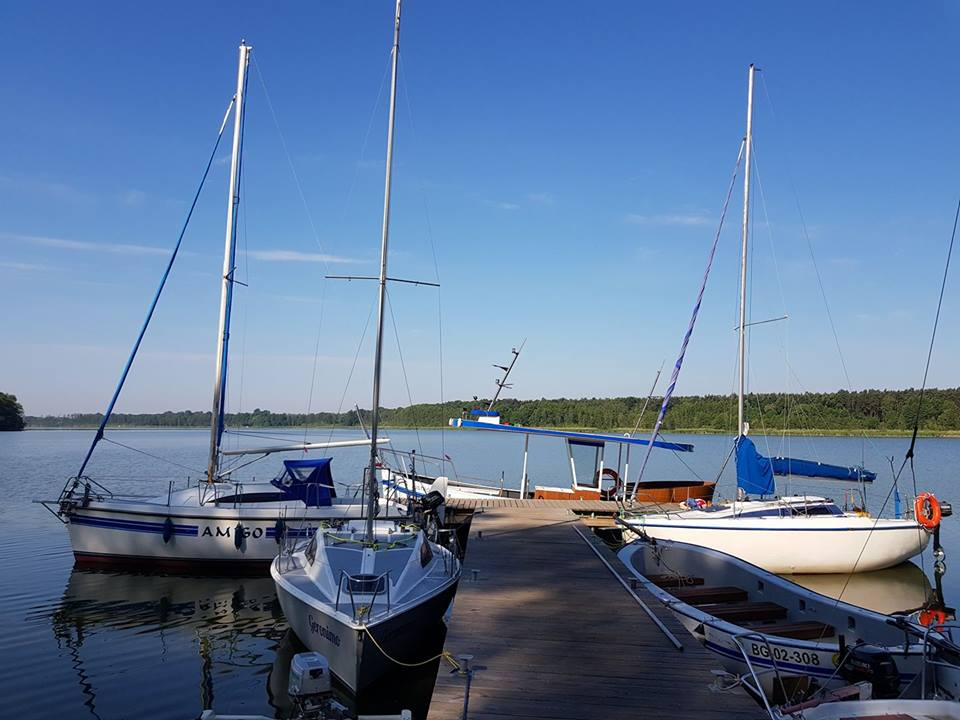 Jachty przycumowane w marinie w Karpicku